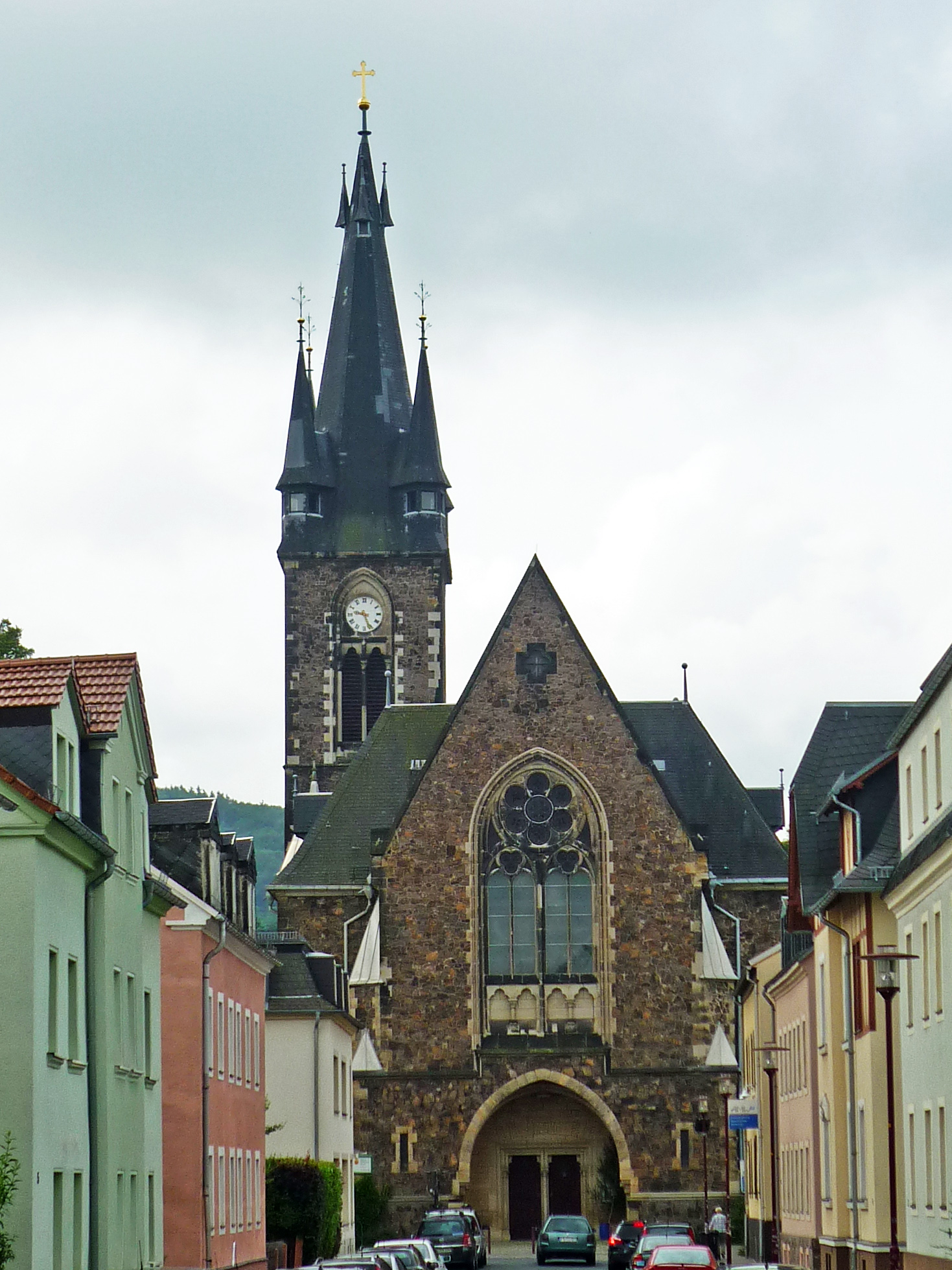 Christuskirche in Freital-Deuben